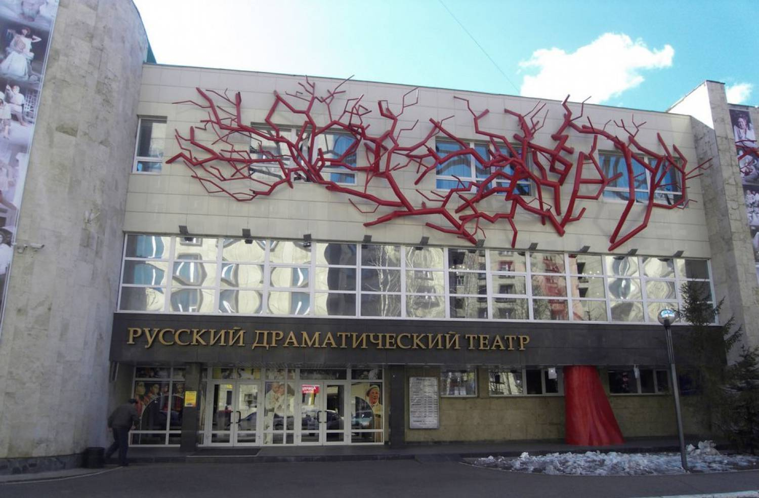 Русский драматический театр «Мастеровые»